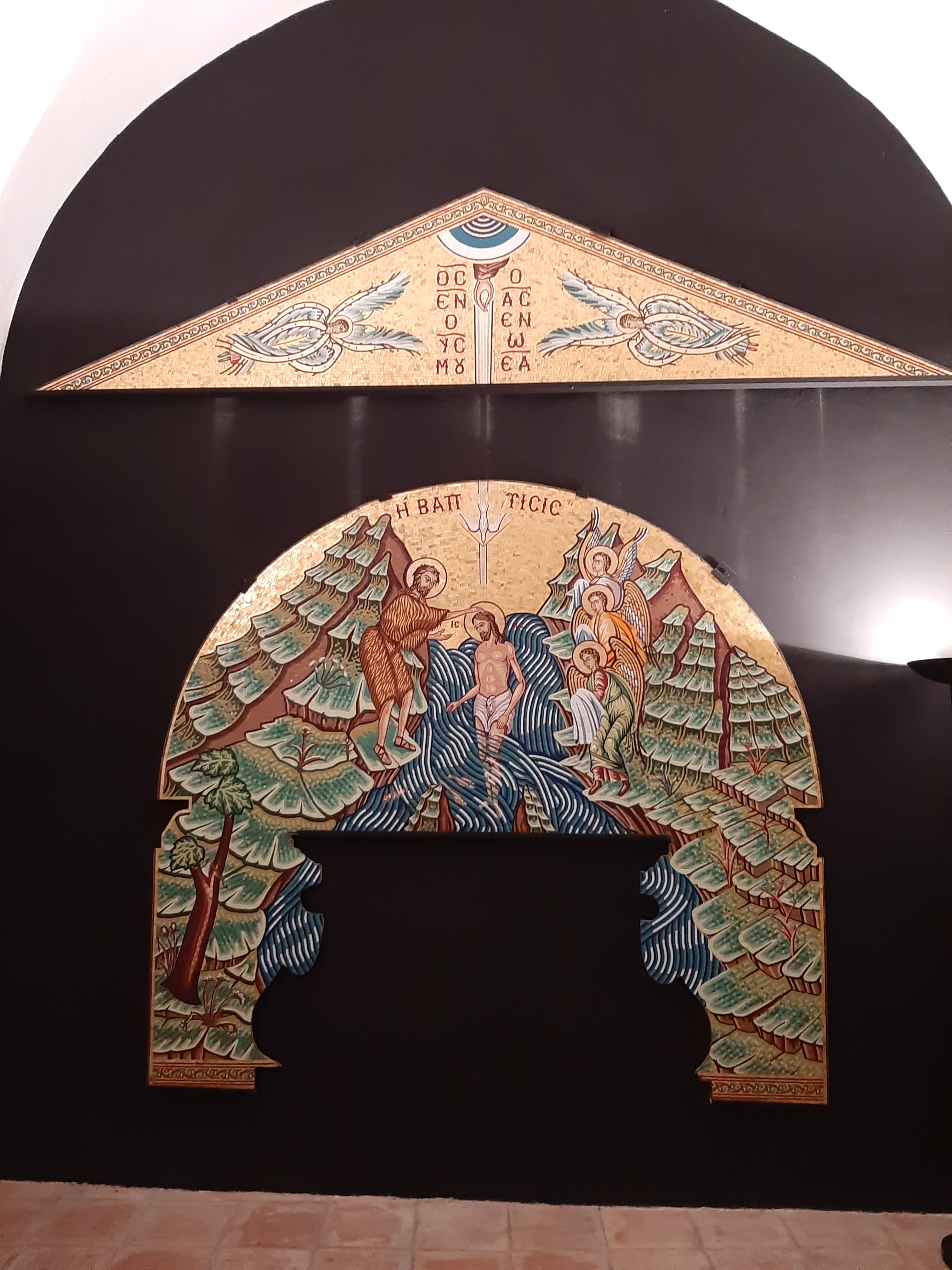 Museo Civico Nicola Barbato - Piana degli Albanesi. Mosaico in stile bizantino dell'Epifania, opera musiva dell'artista italo-albanese Spiridione "Dhoni" Marino (1990).